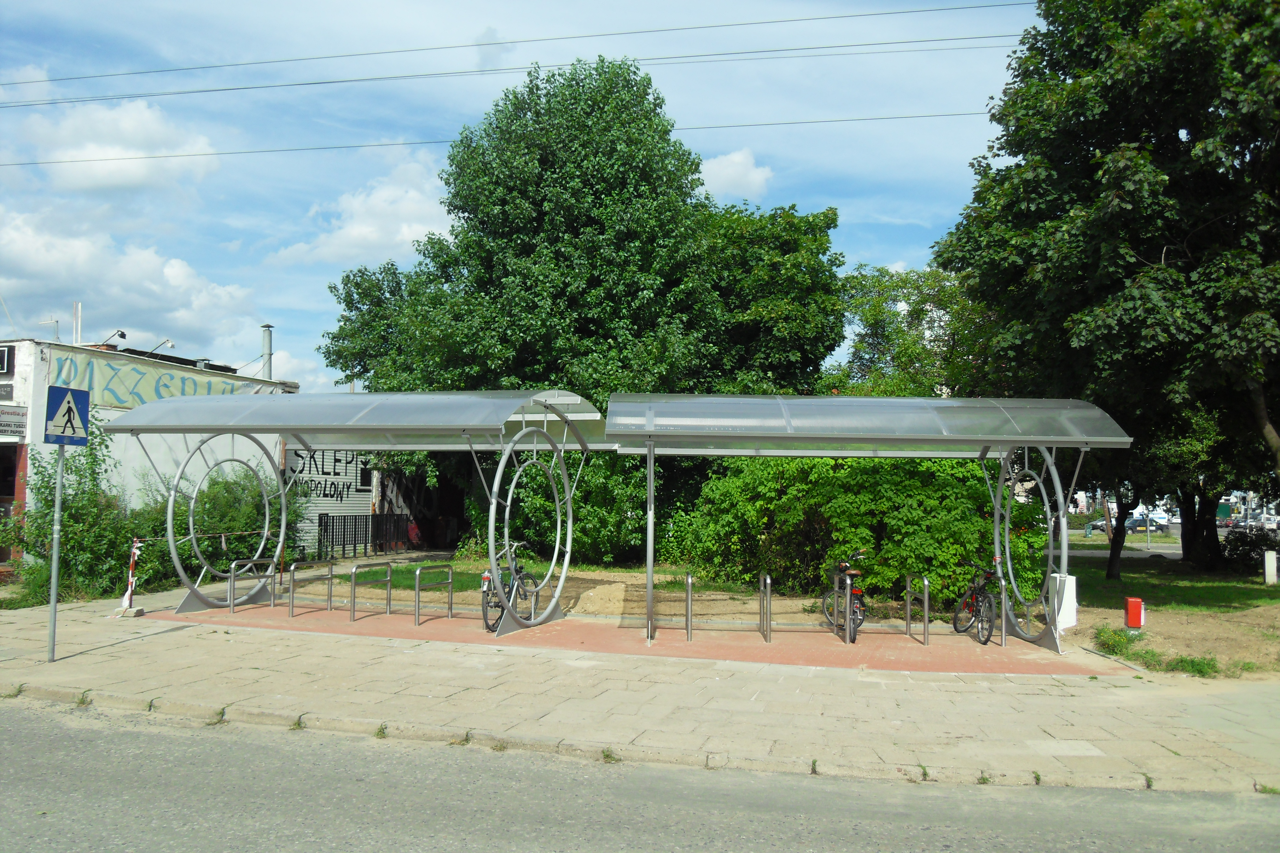 Gdańsk Przymorze Małe, parking dla rowerów przy ul. Kołobrzeskiej.